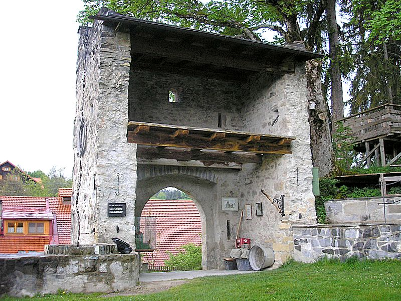 Burg Werdenstein bei Immenstadt im Allgäu (Landkreis Oberallgäu, Bayerisch-Schwaben). Das Burgtor von Osten. Eigene Aufnahme, Mai 2008 / Werdenstein castle near Immenstadt im Allgäu (Landkreis Oberallgäu, Bavaria, Germany). The gate from the east. Own photo, May 2008